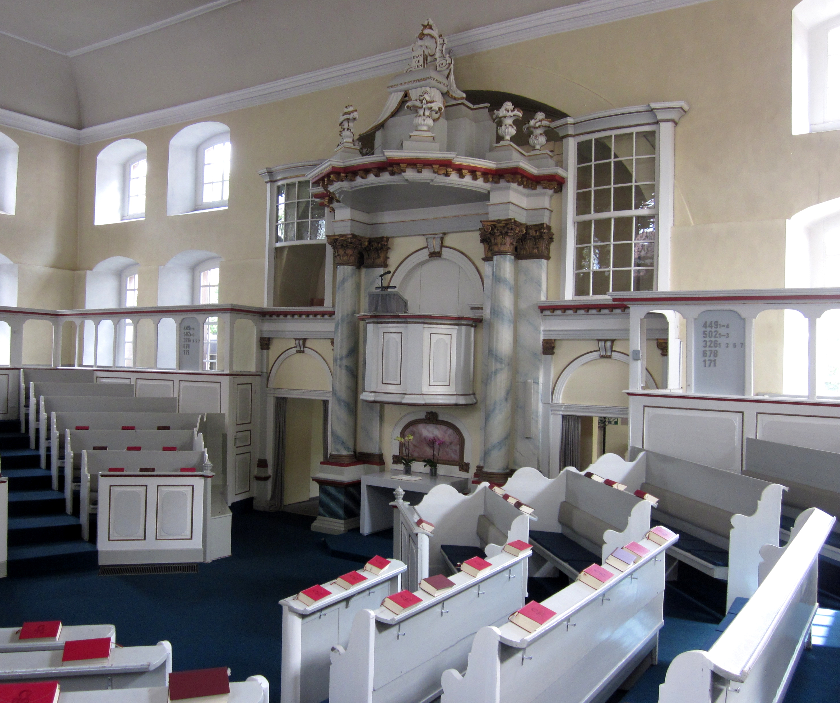 Evangelisch-reformierte Kirche in Göttingen